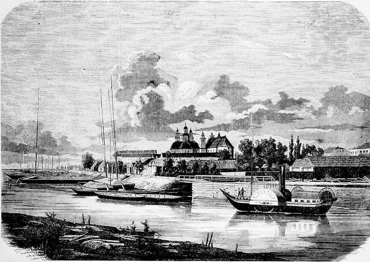 Alsemberg